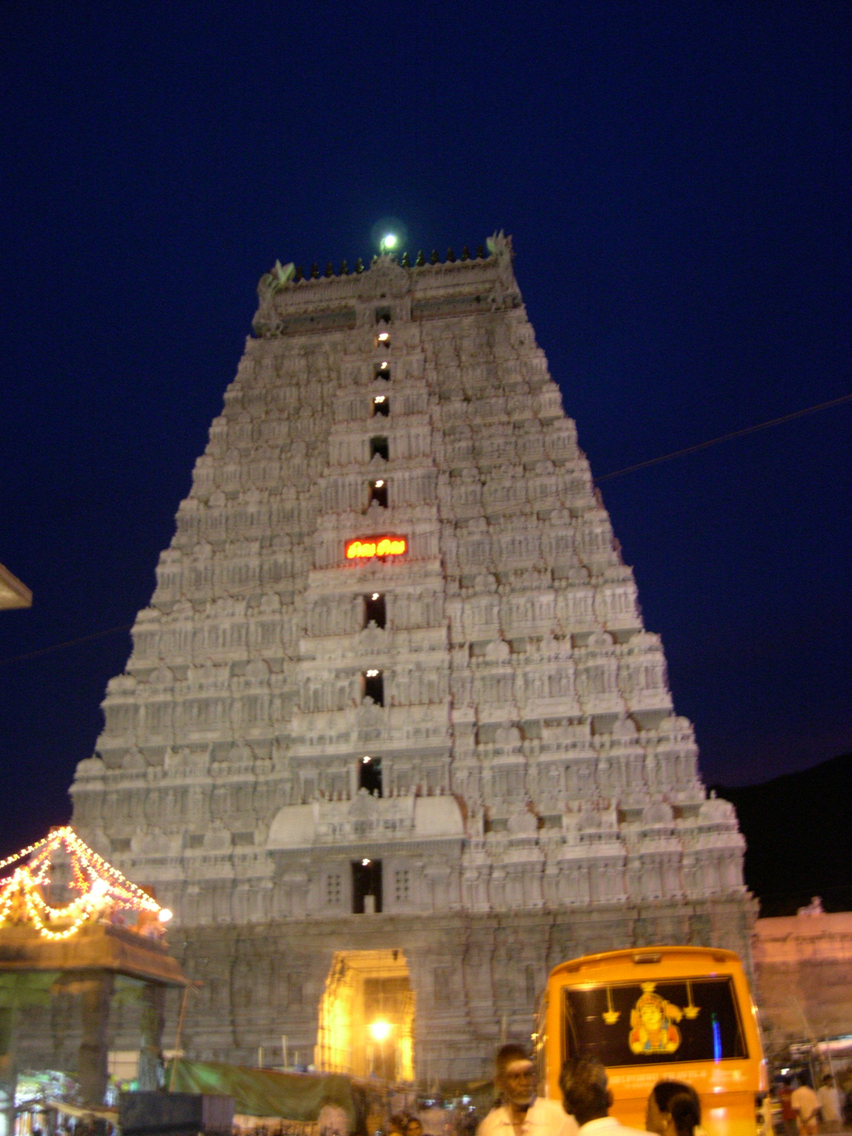 திருவண்ணாமலை அருணாசலேஸ்வரர் கோயில்